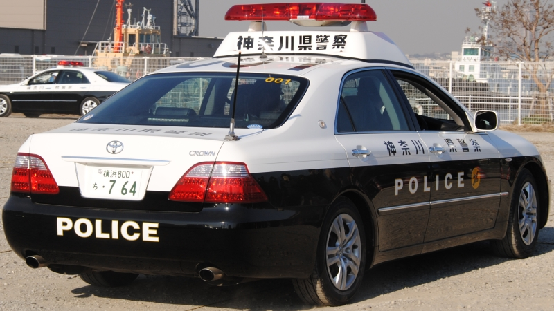 神奈川県警自動車警ら隊の新デザインパトカー。